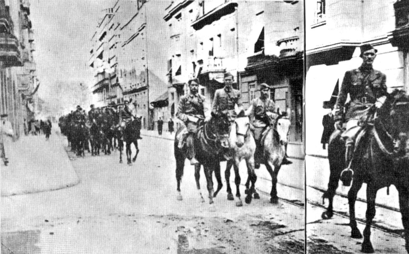 Srpskohrvatski / српскохрватски: Partizanska konjica u ulici Ive Lole Ribara u oslobođenom Beogradu 1944.